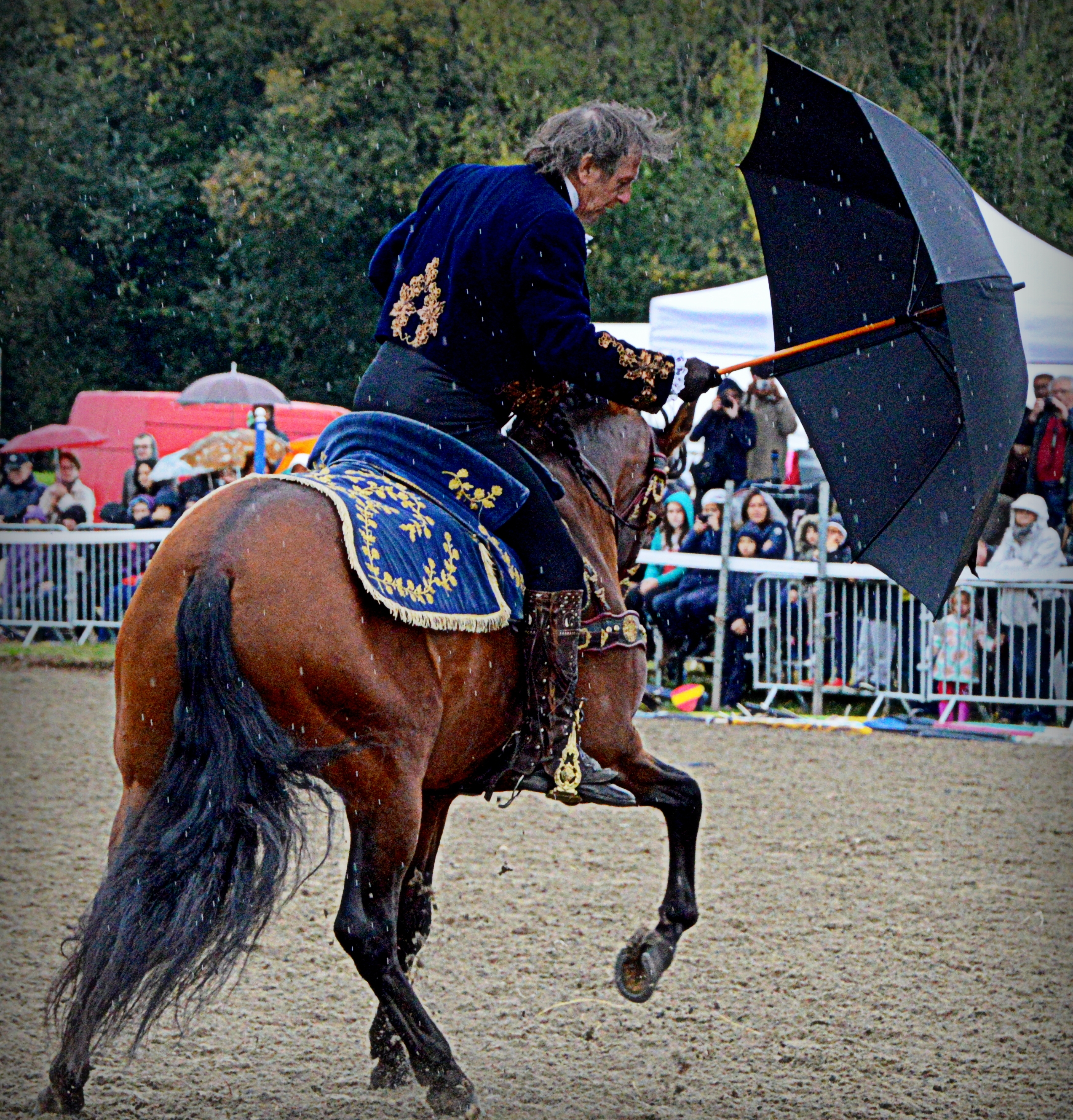 Mario Luraschi dance avec son cheval sous la pluie.